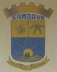 Blason de Sambavia